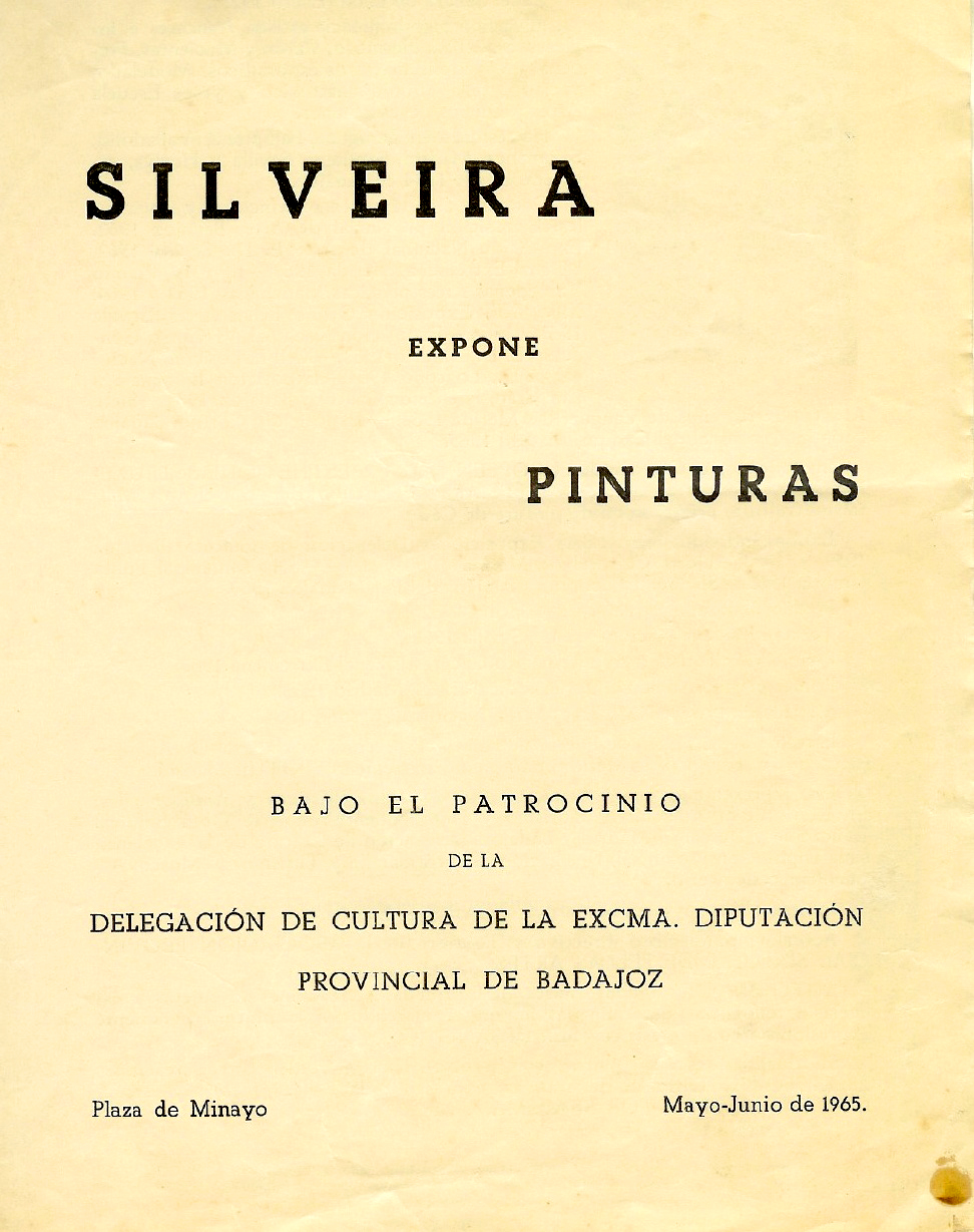 Díptico de la exposición "Silveira Expone Pinturas". Casa de la Cultura de la Diputación Provincial. Badajoz, mayo-junio de 1965. Imp. Provincial. p. 1. Guillermo Silveira García (1922–1987) Description painter, sculptor, military personnel and art educatorDate of birth/death 11 January 1922 11 May 1987Location of birth/death Segura de León BadajozWork periodcirca 1945-1987Work location BadajozAuthority control : Q5888937 VIAF: 100940319 ISNI: 0000 0000 7827 0108 GND: 139488154 BNE: XX4841676 creator QS:P170,Q5888937